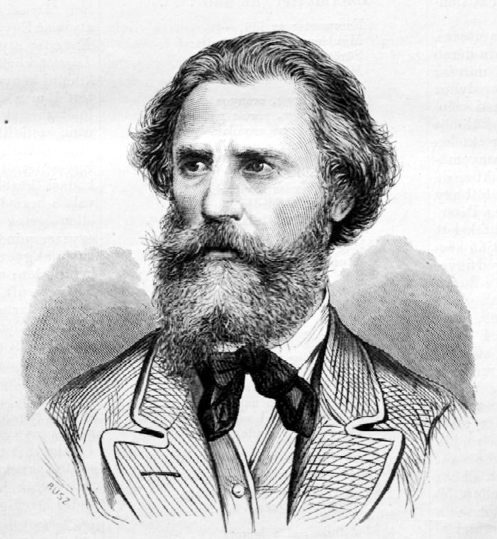 Zichy Mihály festőművész portréja. Rusz Károly metszete